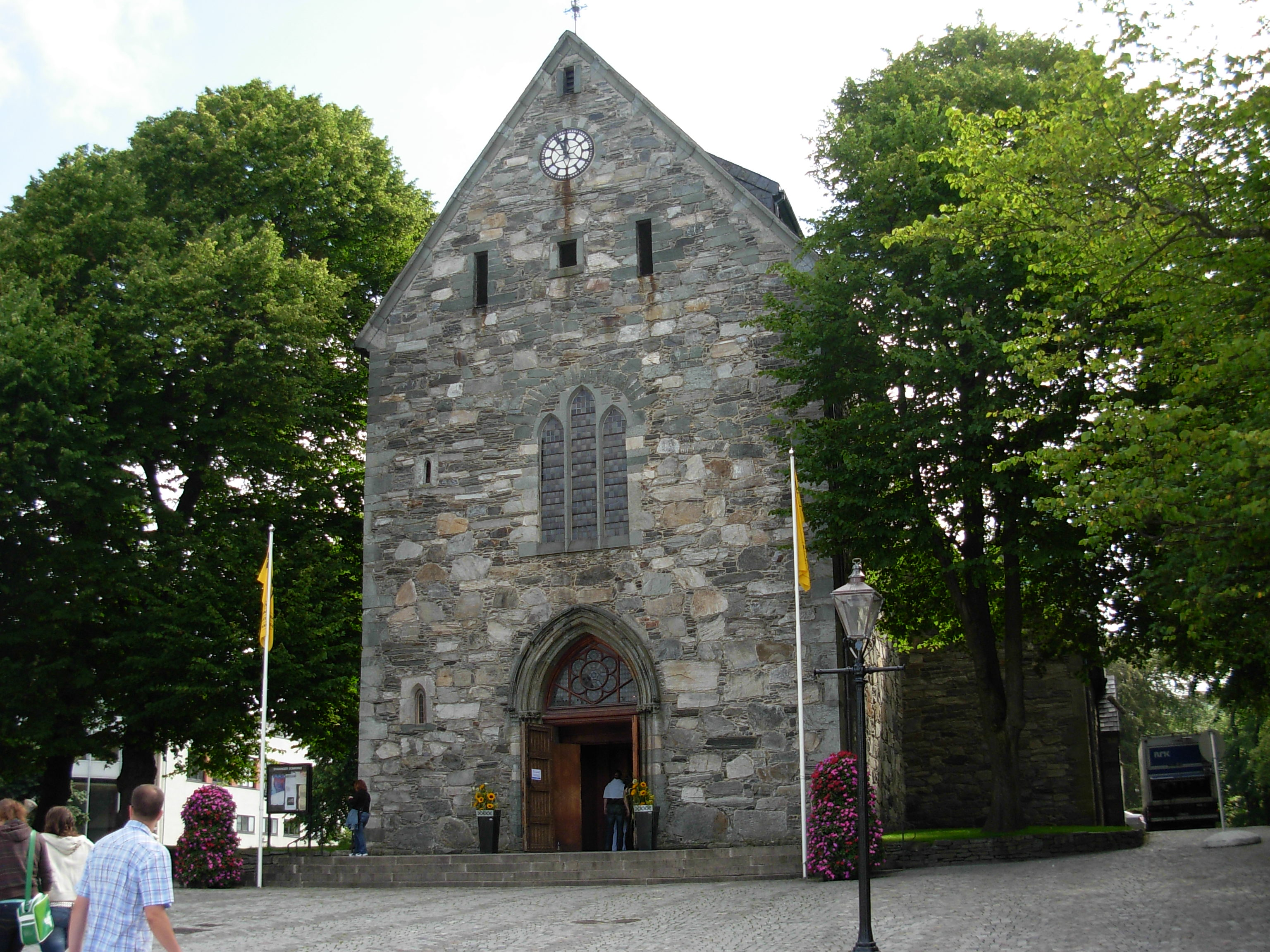 Stavanger domkirke, vestfasaden med inngang